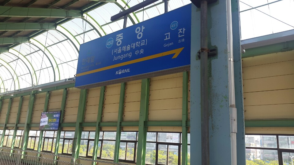 안산선 중앙역 폴사인